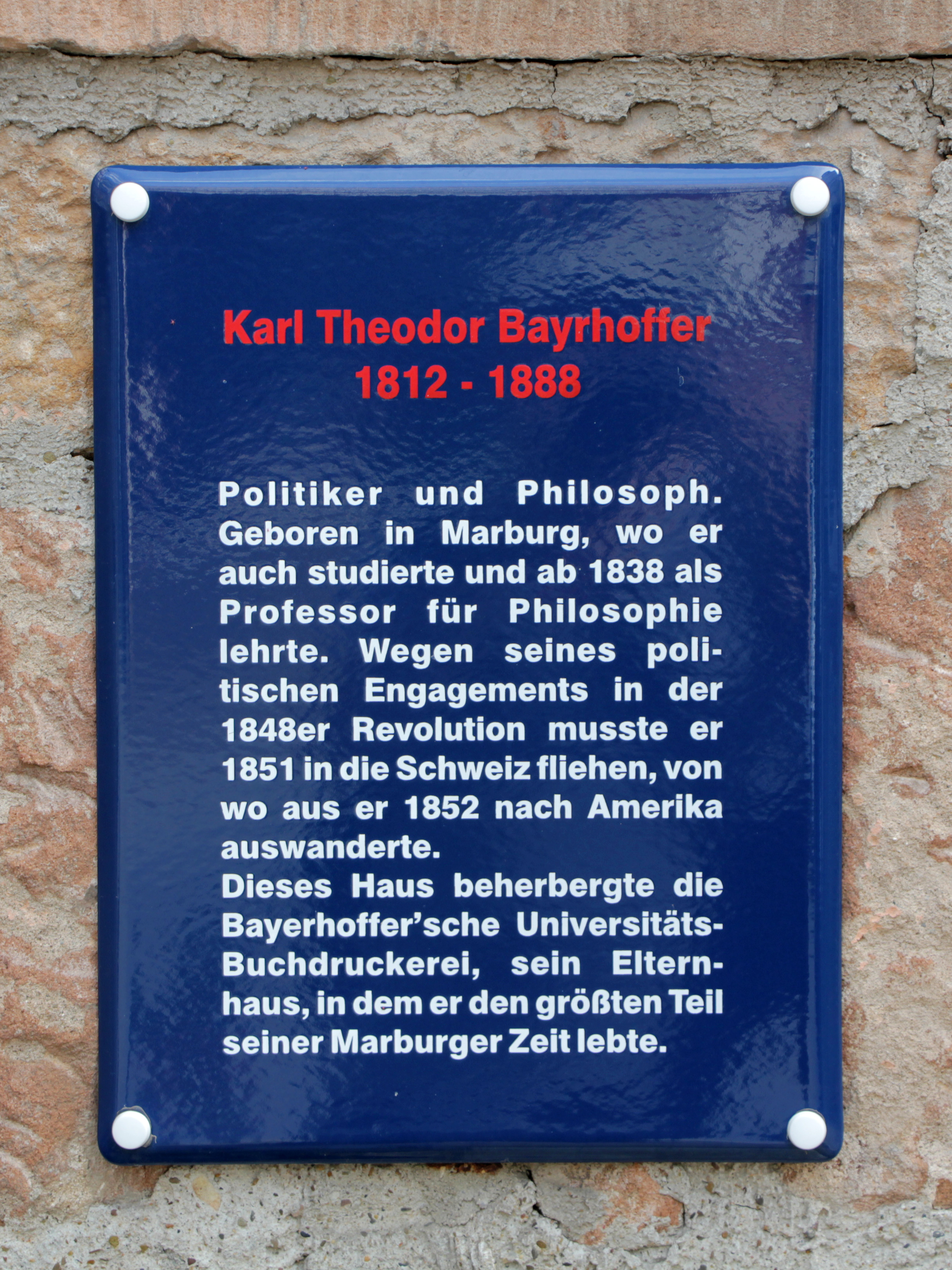 Gedenktafel für Karl Theodor Bayrhoffer (1812–1888) an seinem Elternhaus in Marburg, Hofstatt 1. Ansicht von Westen.